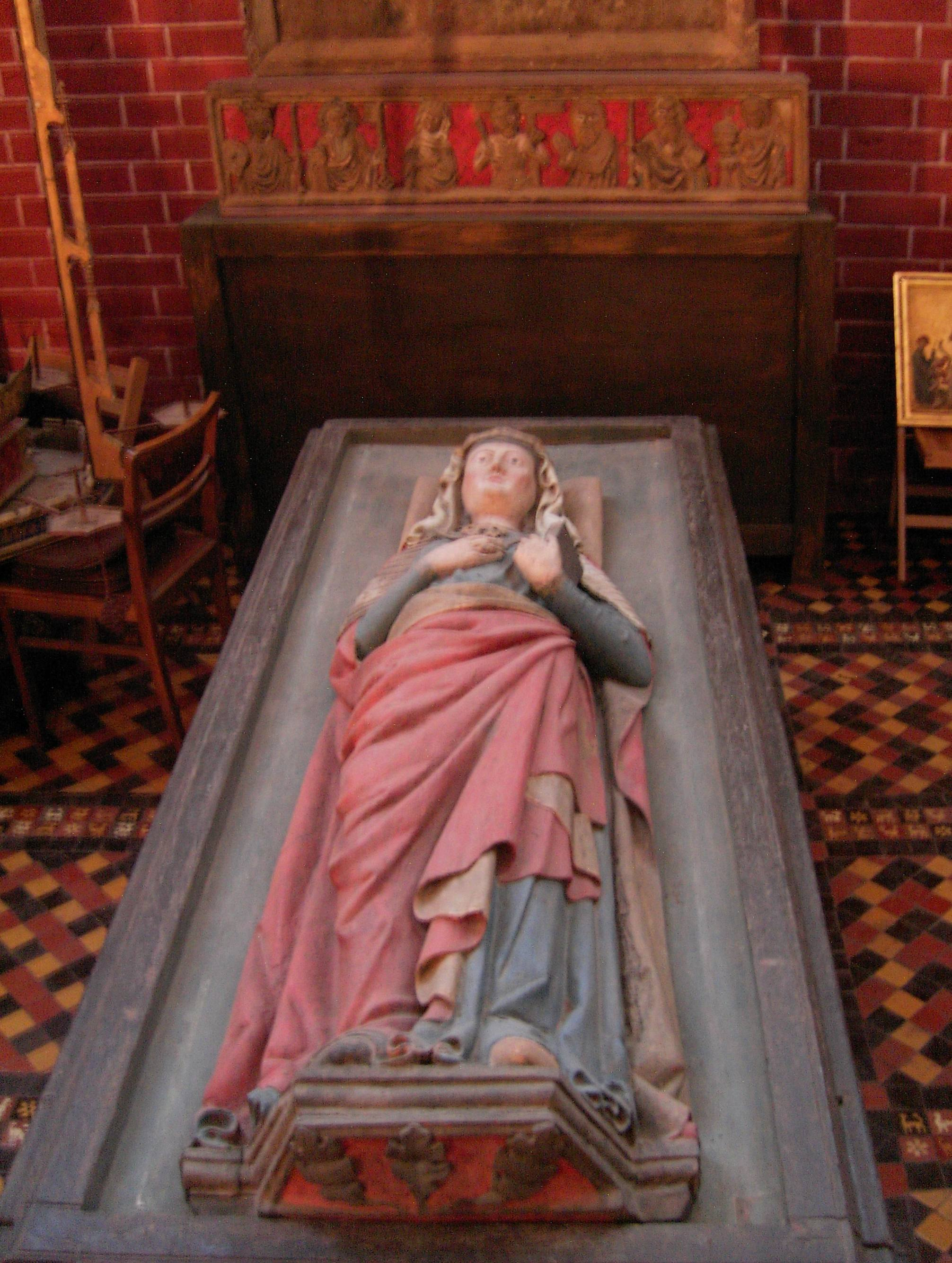 Grabplatte von Margarete Sambiria (Margaretha von Dänemark) im Münster von Bad Doberan. Die Grabplatte stammt aus dem 13. Jahrhundert.